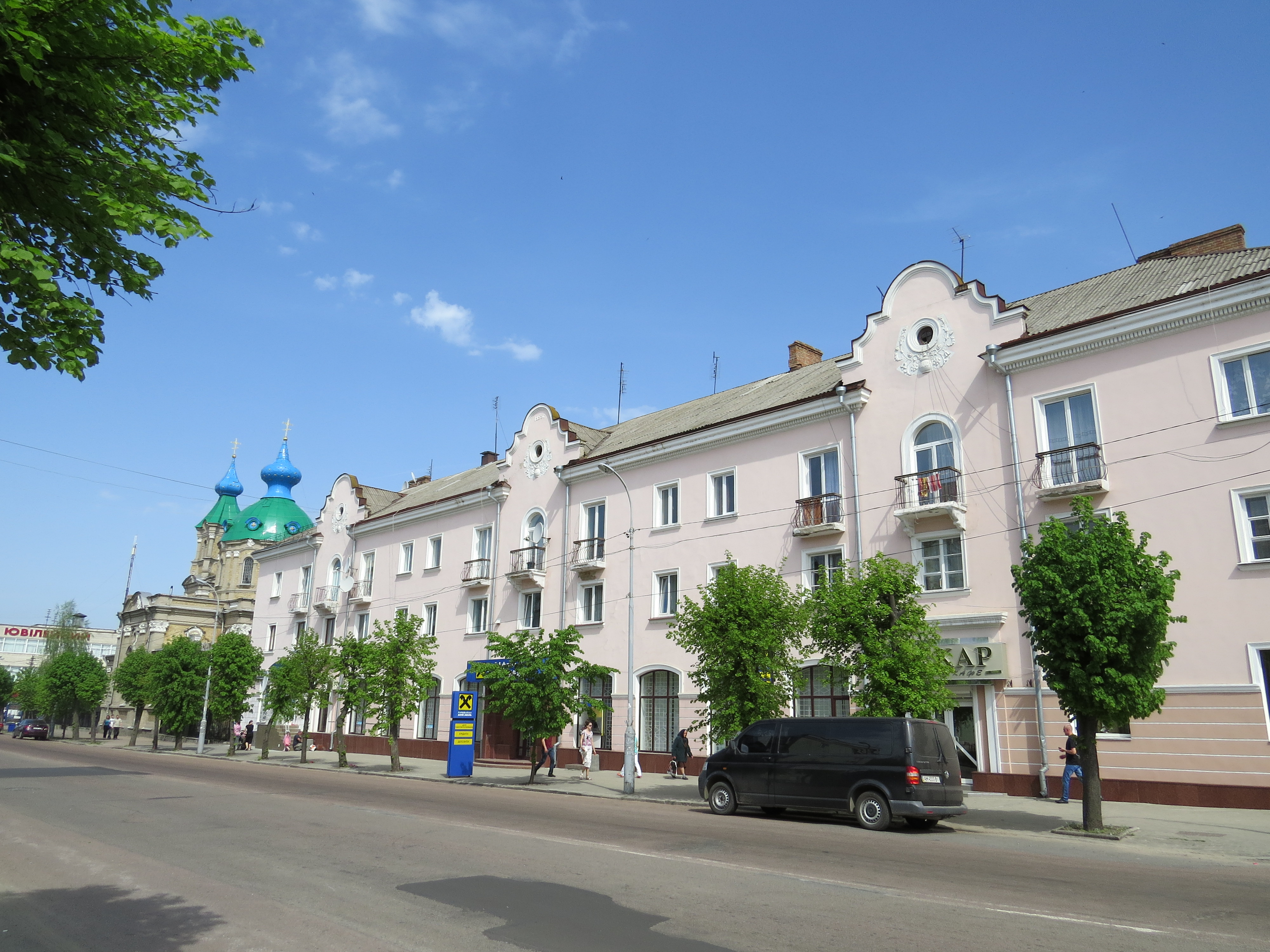 м. Бердичів вул. К.Лібкнехта, 11,13